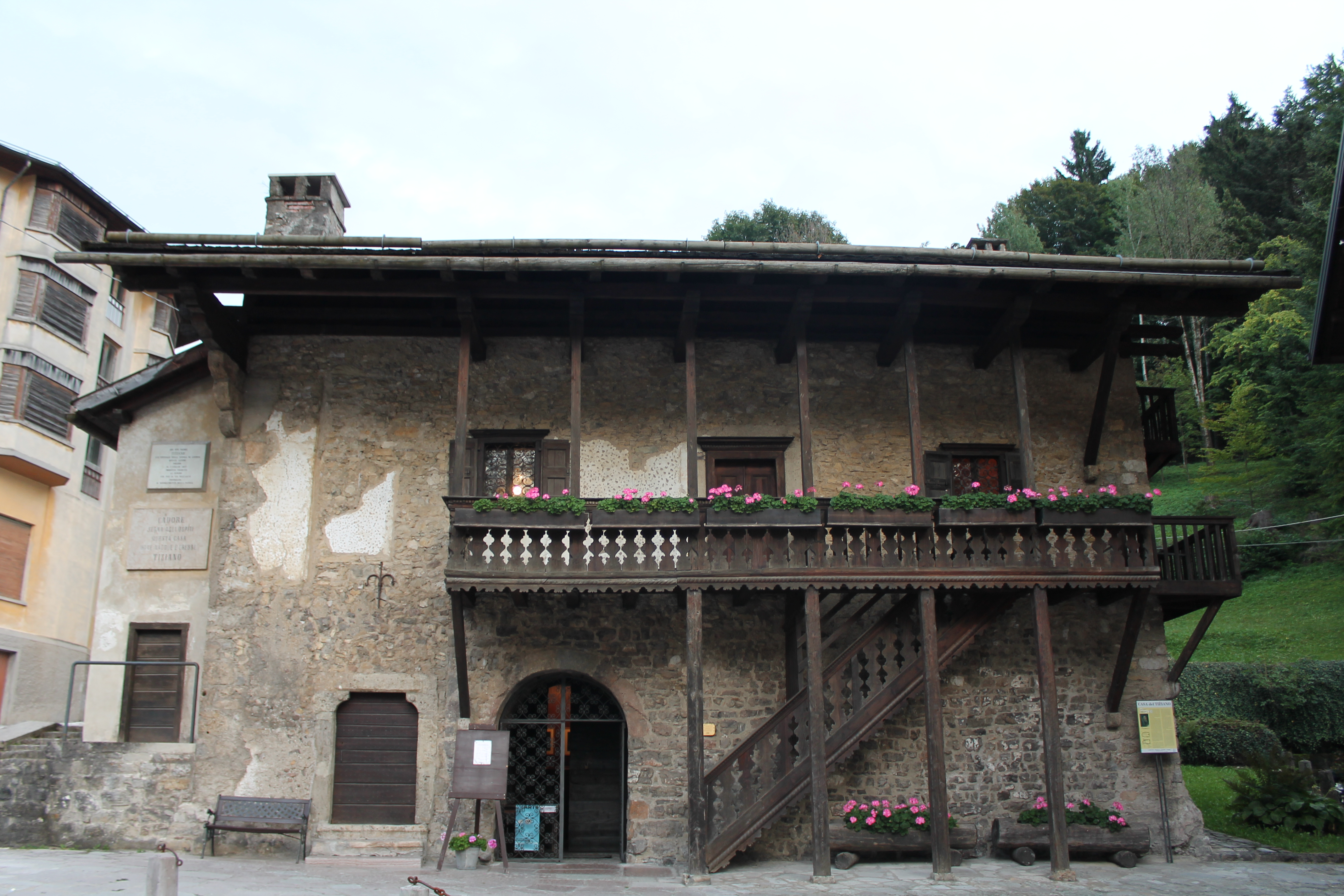 Casa natale di Tiziano Vercellio This is a photo of a monument which is part of cultural heritage of Italy.